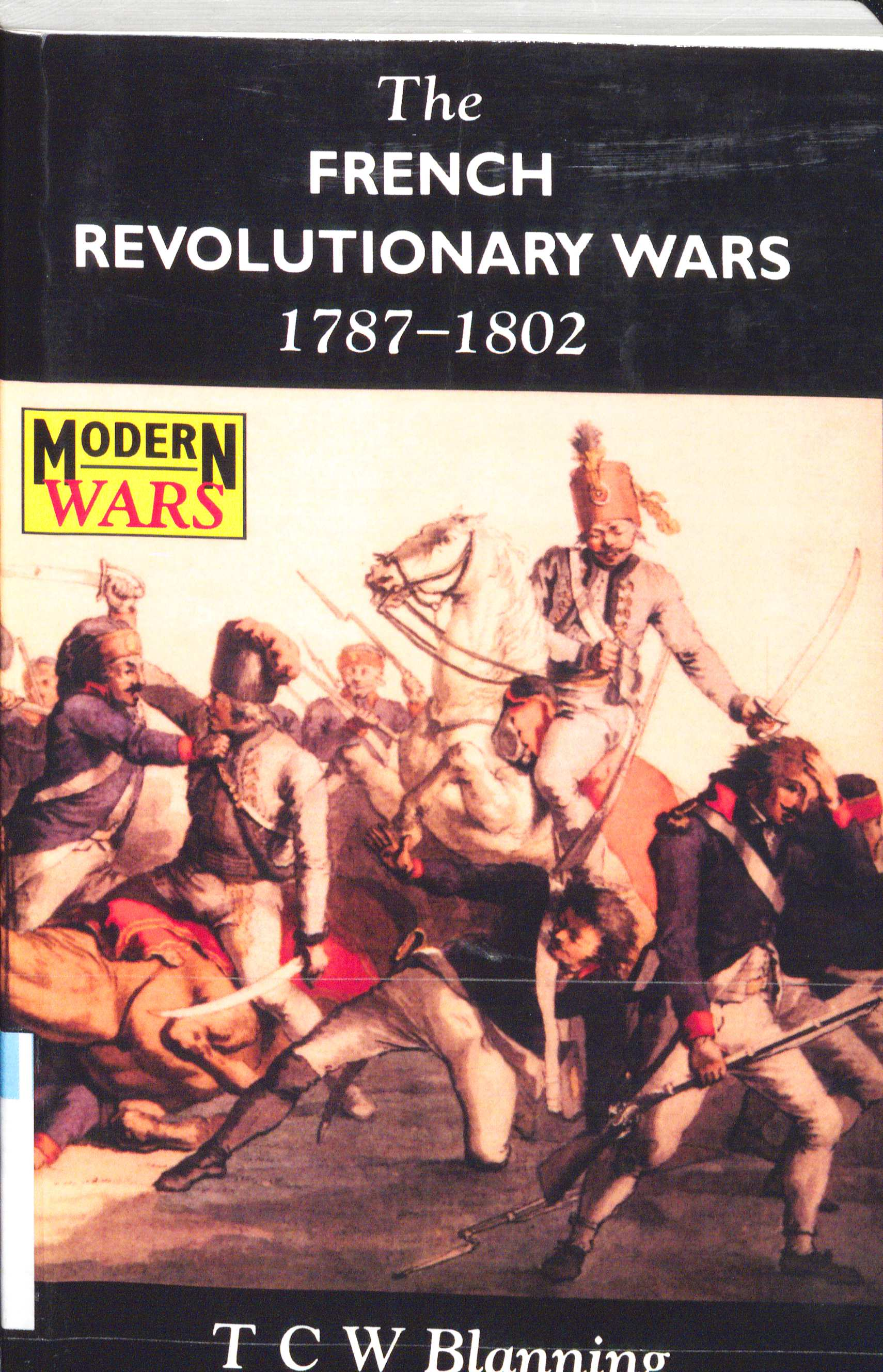 Tim Blanning The French Revolutionary Wars 1787-1802. Edward Arnold, 1996 cover picture by Vincenz Georg Kininger Die Husaren retten ihren Obersten bei Bellheim / Bavay 1792